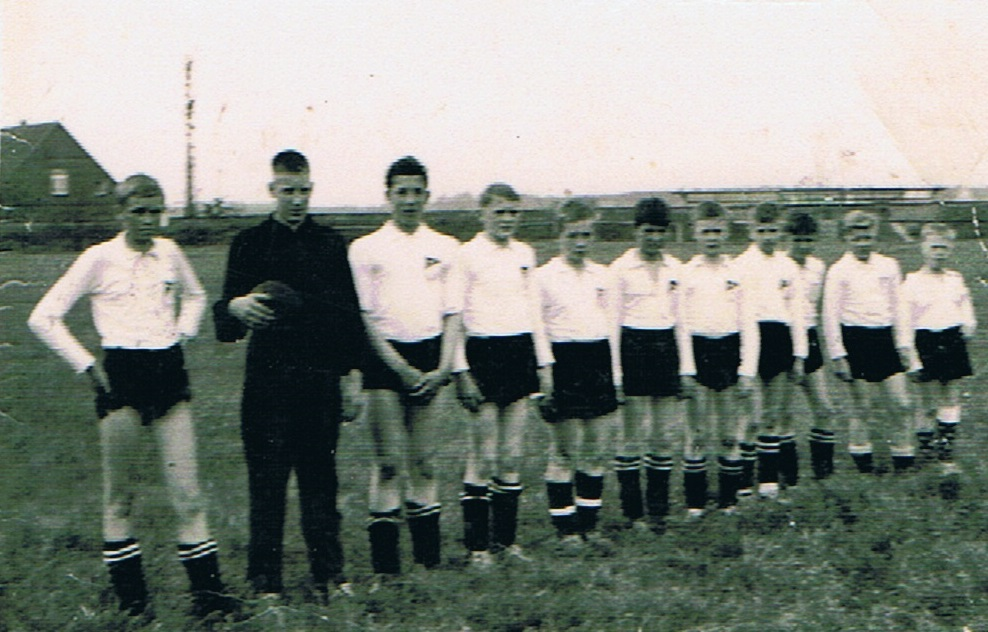 Jugendmannschaft, Walter Plaggemeyer 2. von rechts.